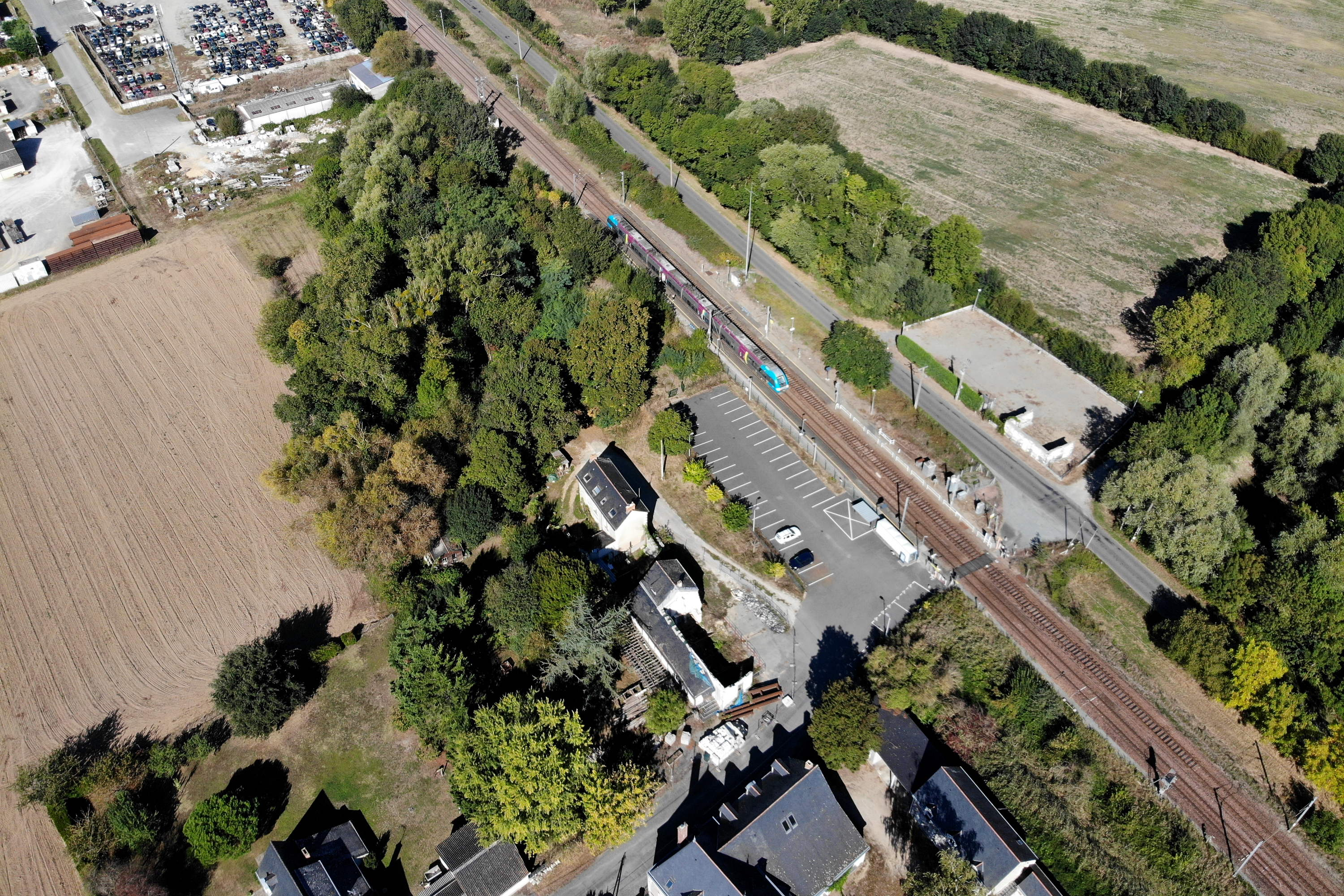 Une Z 27500 s'arrête en gare de La Bohalle, assurant le TER 859011 (omnibus Saumur - Angers du dimanche).